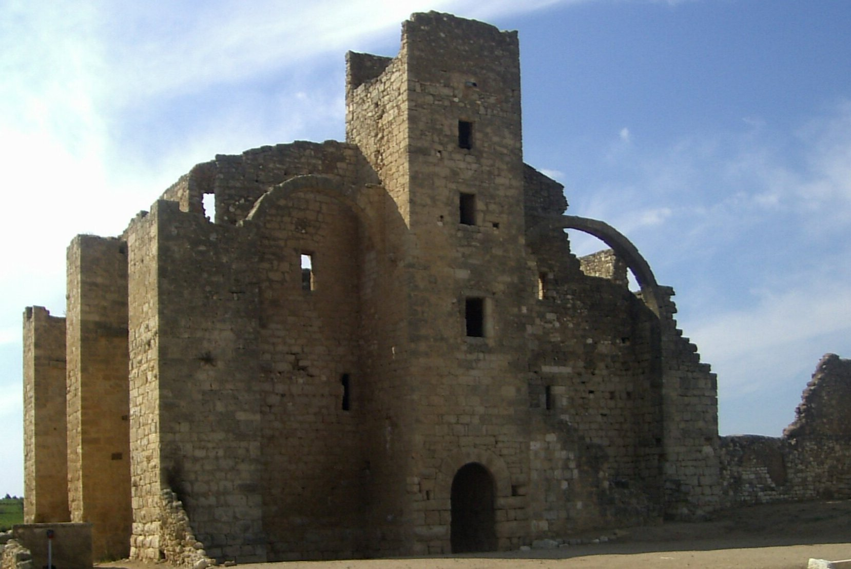 Grange cistercienne de Fontcalvy (ruines de l' ancienne) d'Ouveillan